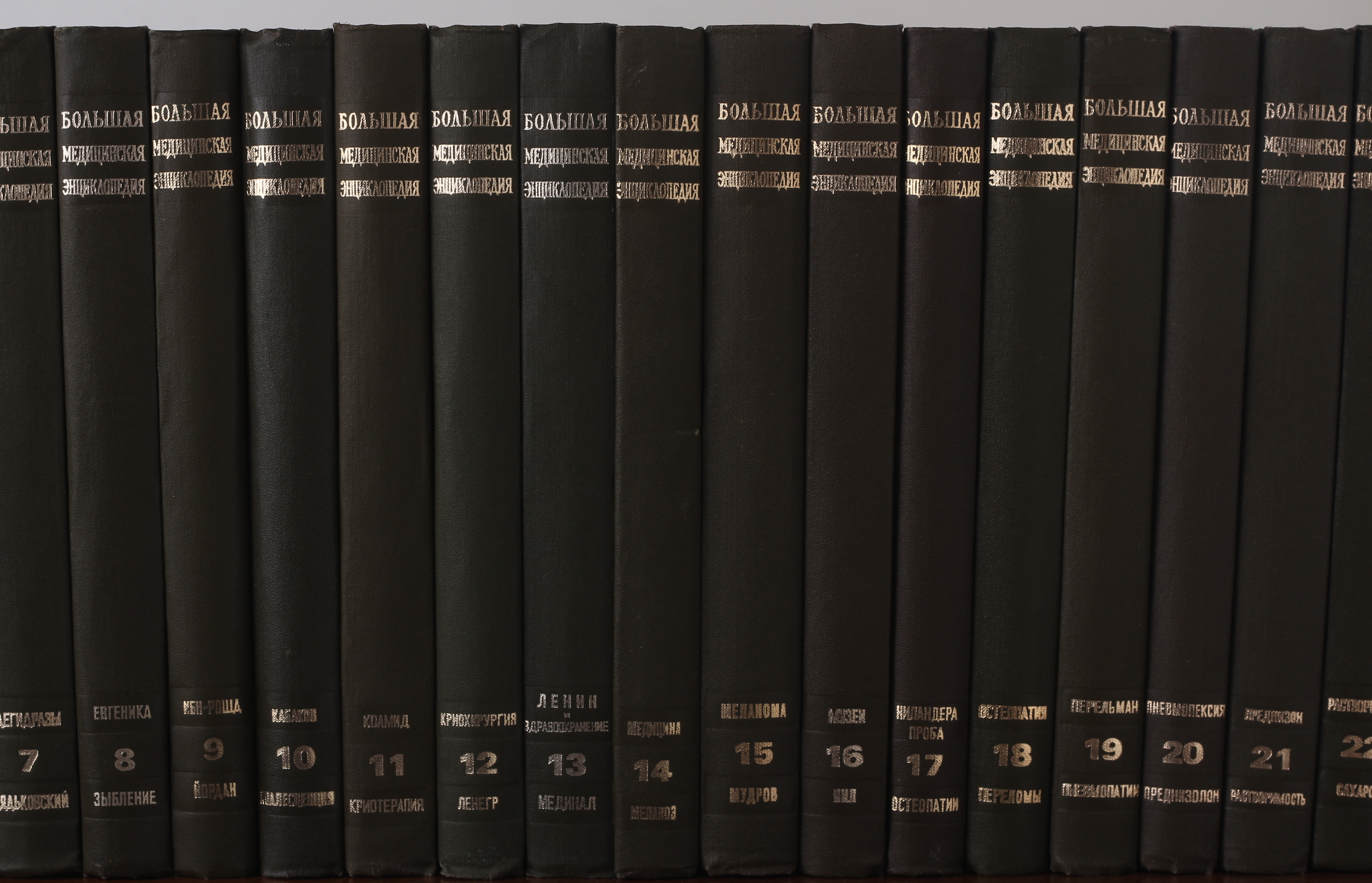 Большая медицинская энциклопедия третье издание.